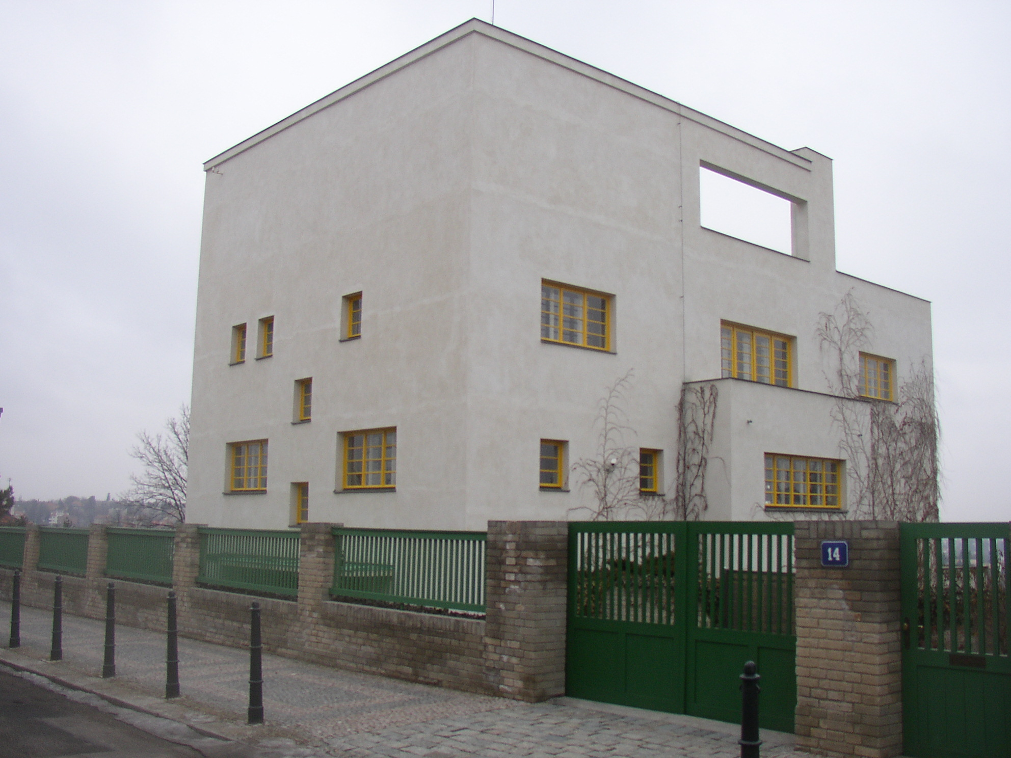 Müllerova vila od Adolfa Loose v Praze-Střešovicích. Pohled od J.